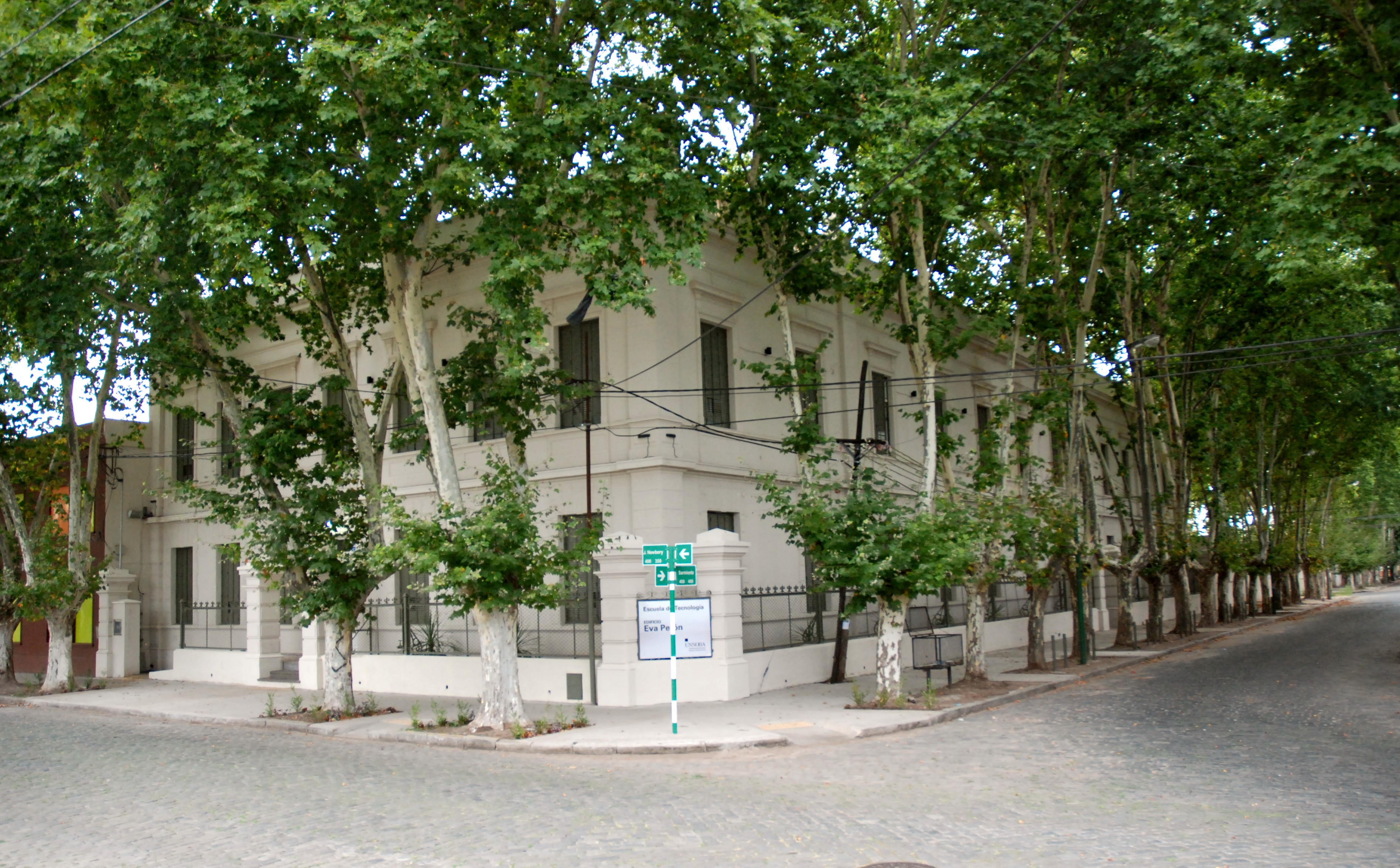 Edificio Eva Perón de la UNNOBA (Universidad Nacional del Noroeste de la Provincia de Buenos Aires). Junín, Argentina.